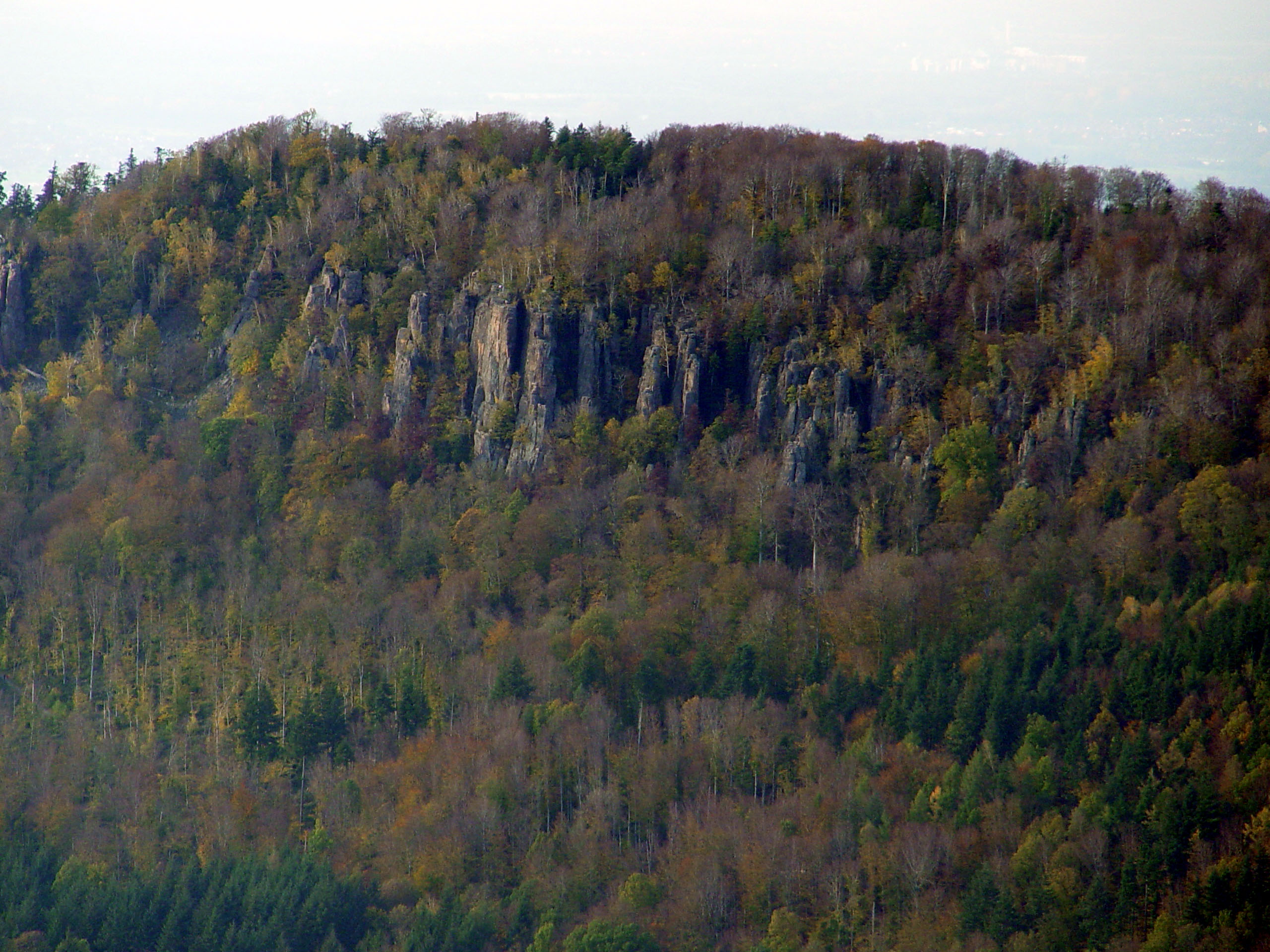 Motiv: Die Battert Felsen sind über Baden-Baden gelegen, direkt neben dem Schloss Hohenbaden. Sie werden gerne als Kletterfelsen benützt. Ansicht vom Merkur, dem Hausberg von Baden-Baden. Fotografiert von Martin Dürrschnabel Kamera Sony DSC-F717